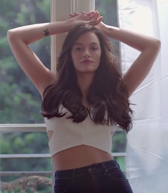 Oriana Sabatini en anuncio para Elvive